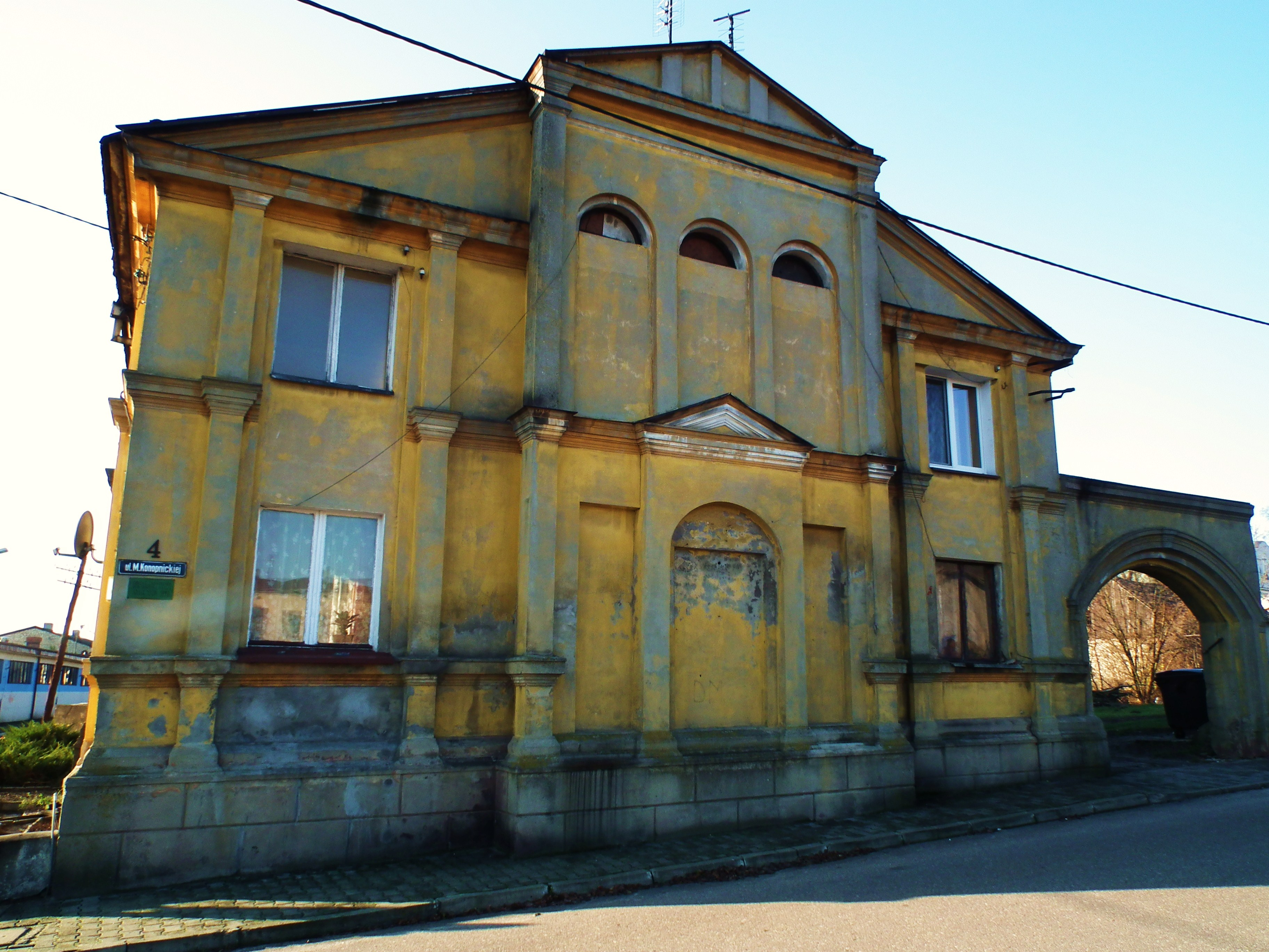 Dawna synagoga w Dąbiu nad Nerem.